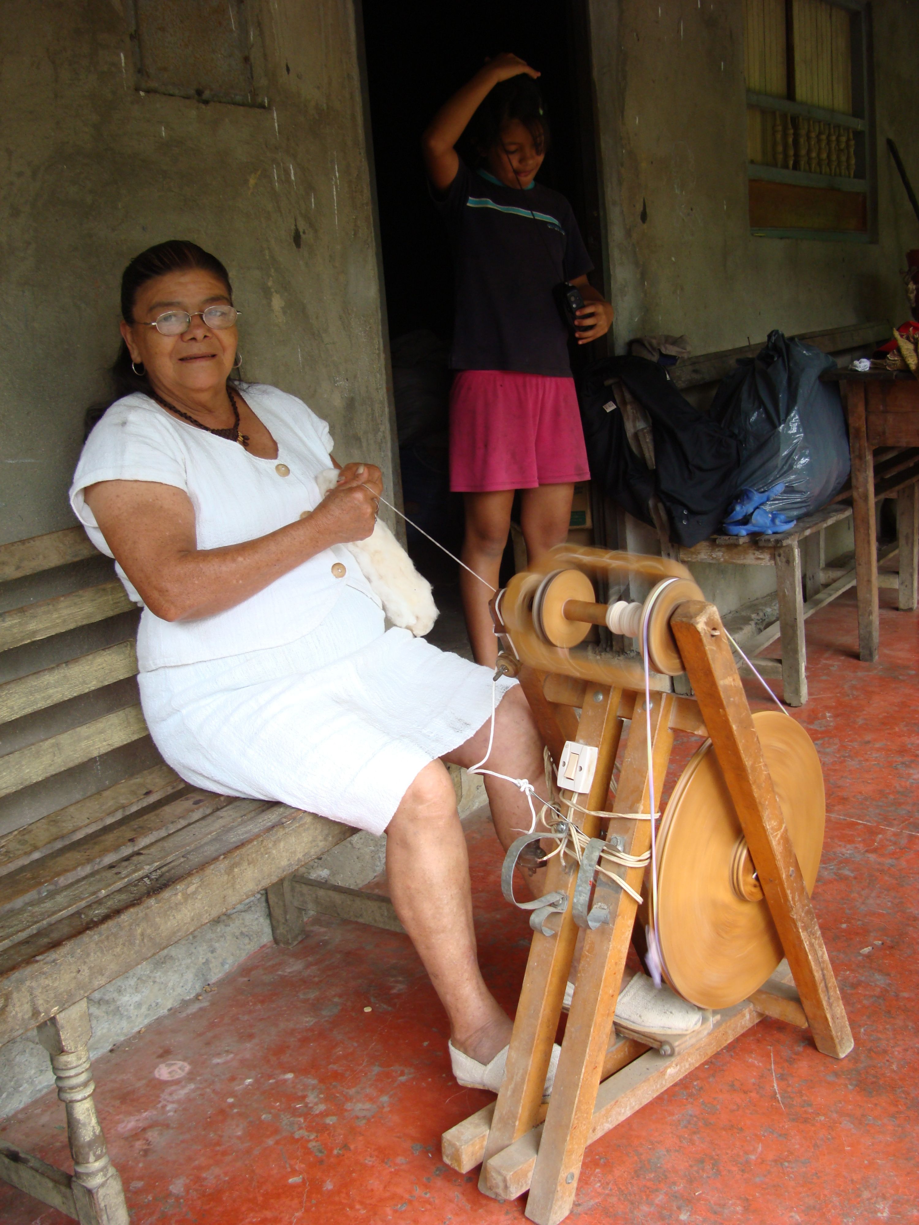 Mujer campesina de la Corporación de Recuperación del Lienzo, hilando algodón orgánico,vereda el Salitre, Charalá, Santander